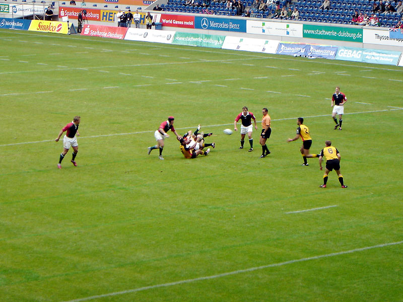 Rugbyspiel Deutschland-Großbritannien, World Games 2005 Duisburg, Vorrunde